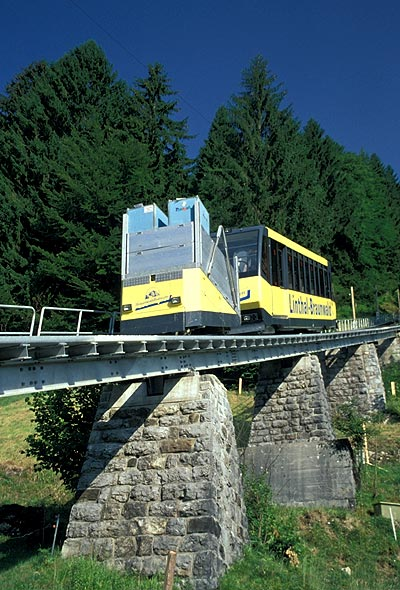 Braunwaldbahn near Braunwald GL, Switzerland